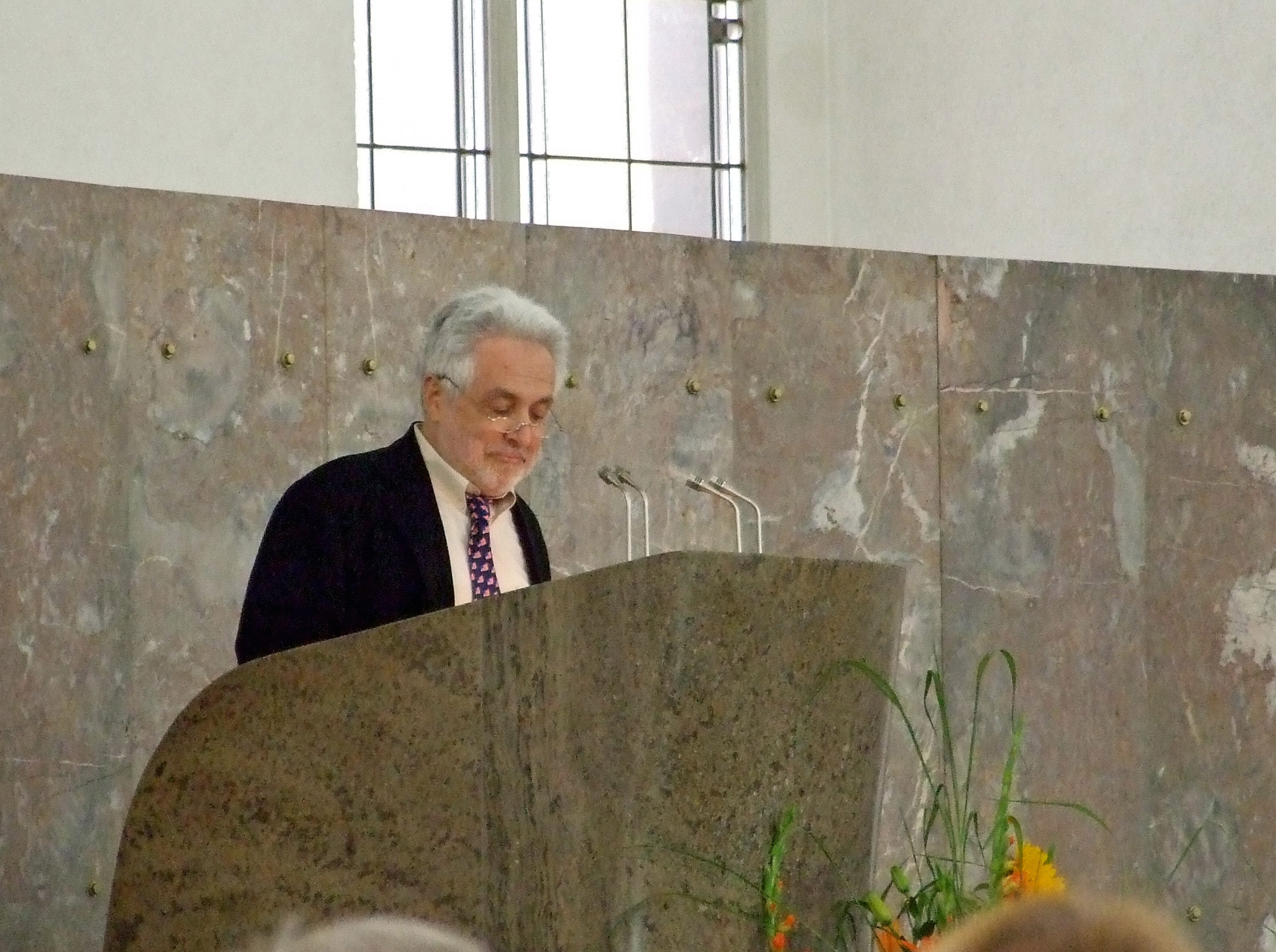 Henryk M. Broder, bei seiner (Dankes-)Rede in der Paulskirche 2007